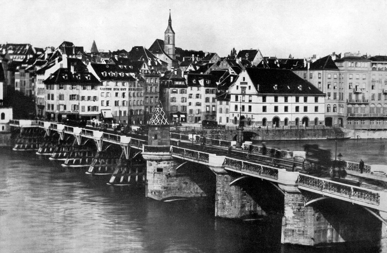 Alte Rheinbrücke in der 2. Hälfte des 19. Jahrhunderts